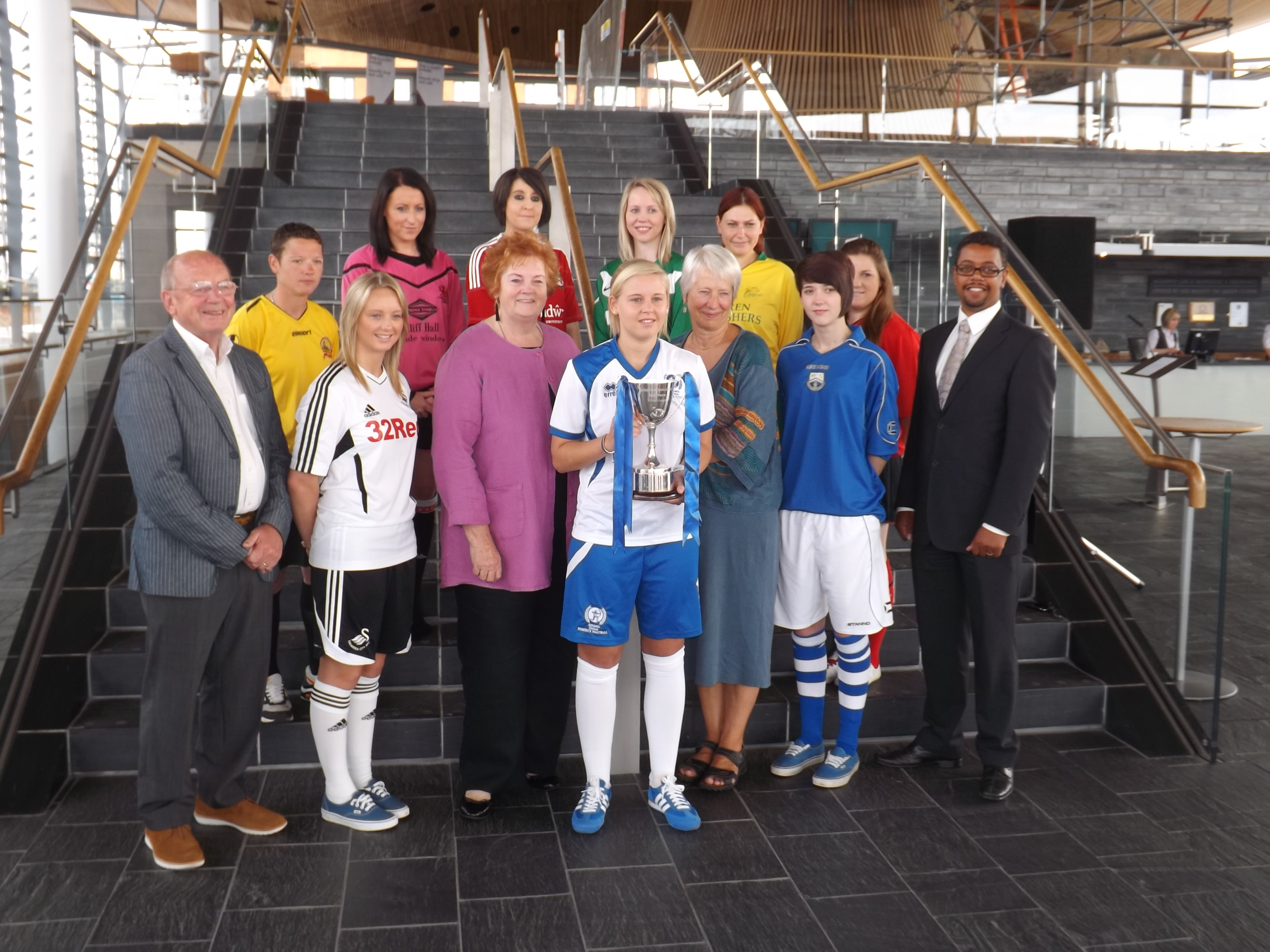 The Presiding Officer sponsors the launch at the Senedd / Y Llywydd yn noddi'r lansiad yn y Senedd